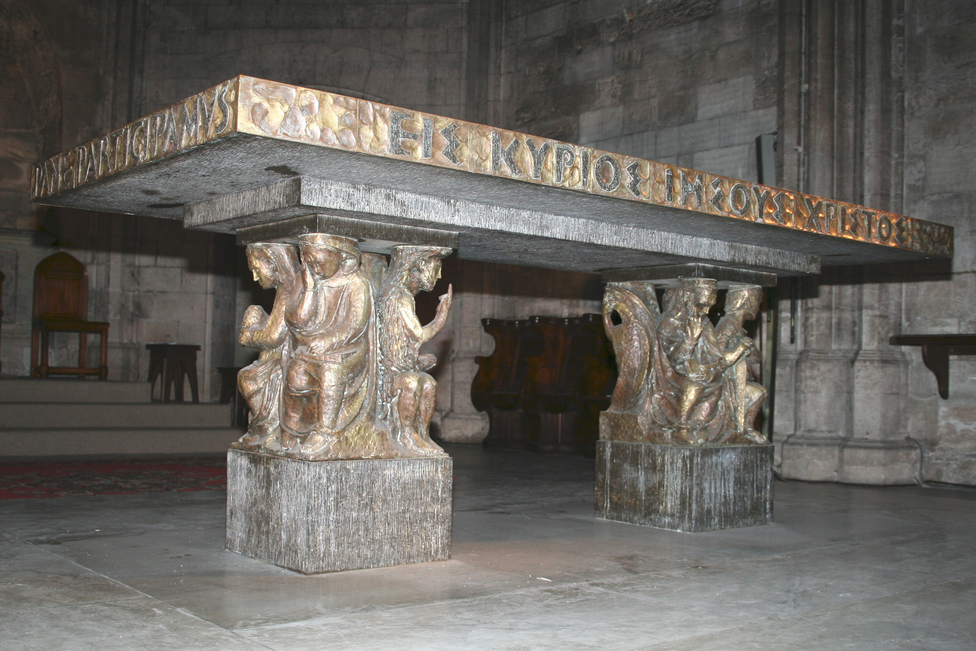 Maître autel de l'abbaye de Saint-Victor, oeuvre des compagnons du devoir, consacré en 1966.